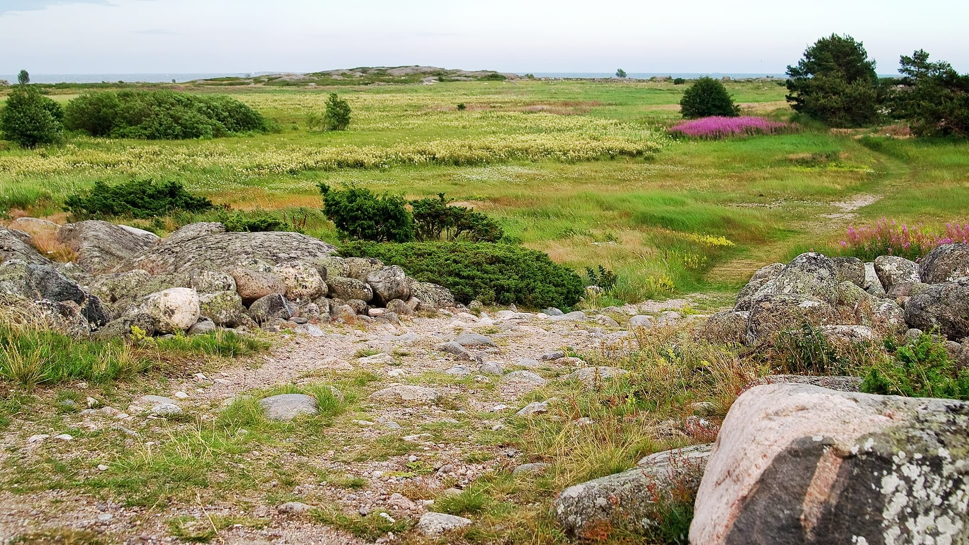 Utön itäinen niitty.